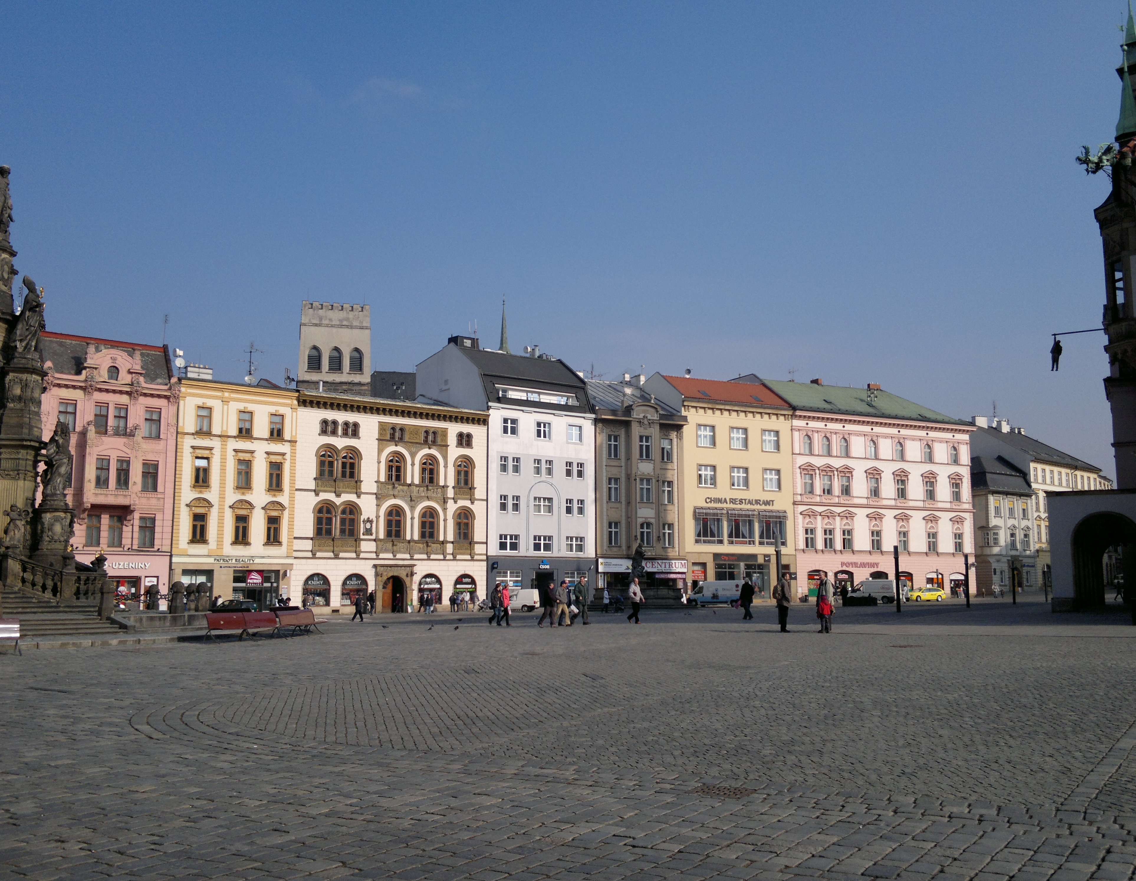 Horní náměstí v Olomouci